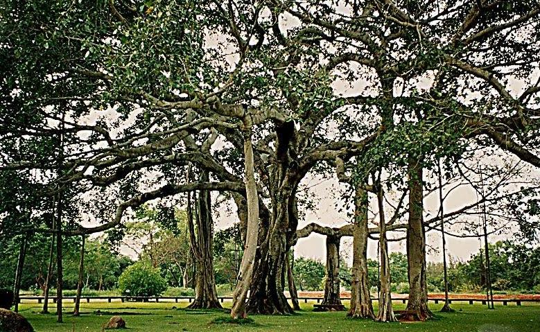 తిమ్మమ్మమర్రి మాను